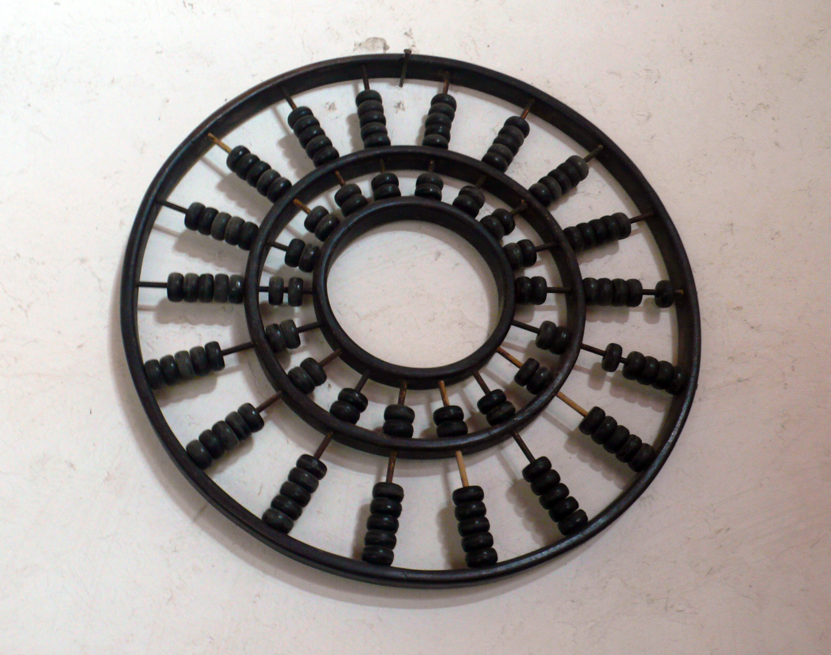 环形算盘。